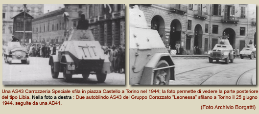 torino